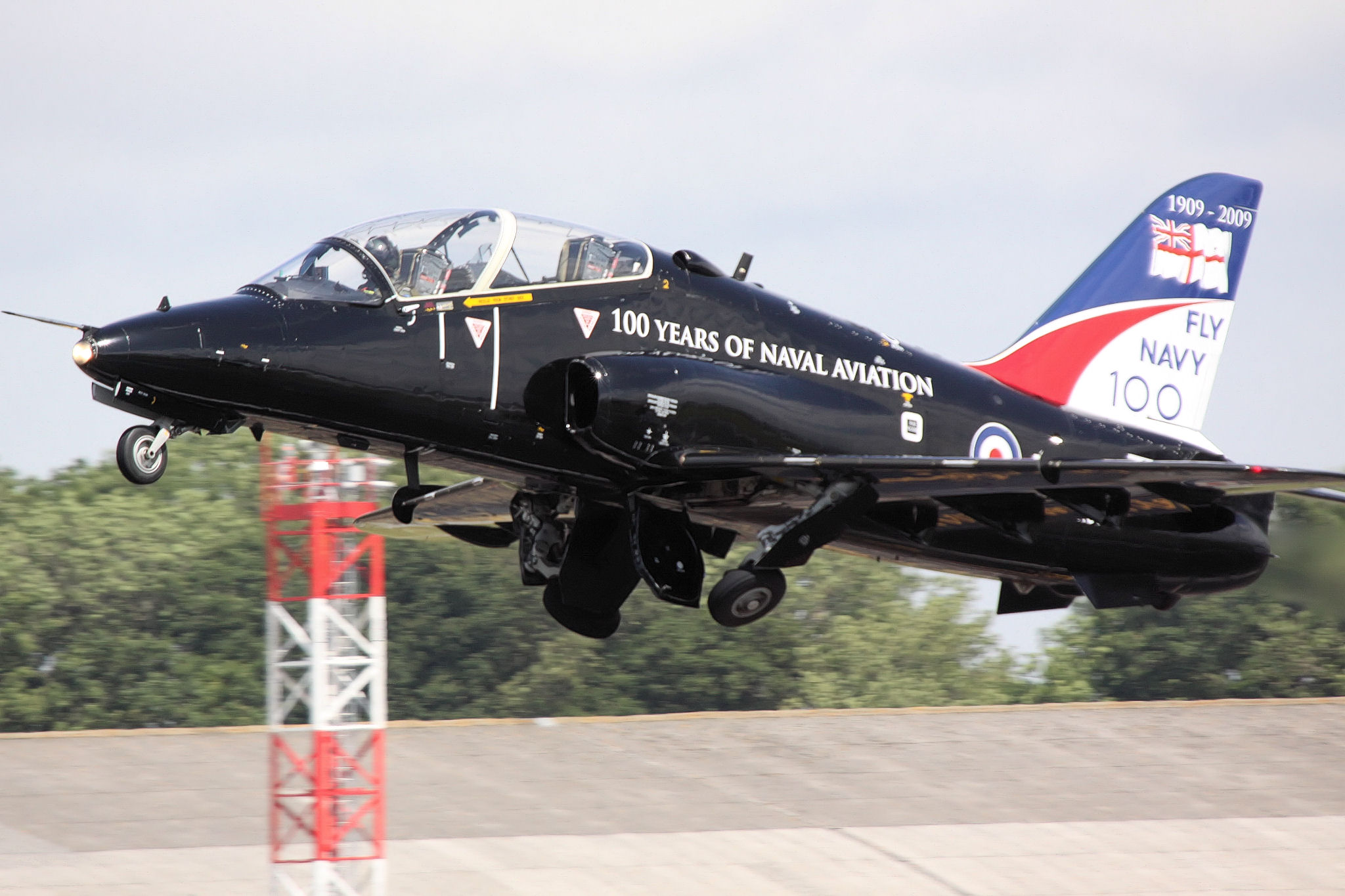 Hawk - RIAT 2009